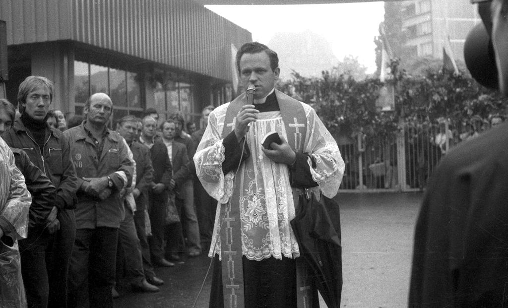 Ksiądz Henryk Jankowski, proboszcz stoczniowej parafii pw.św. Brygidy w Gdańsku podczas wspólnej modlitwy ze strajkującymi w Stoczni Gdańskiej im. Lenina